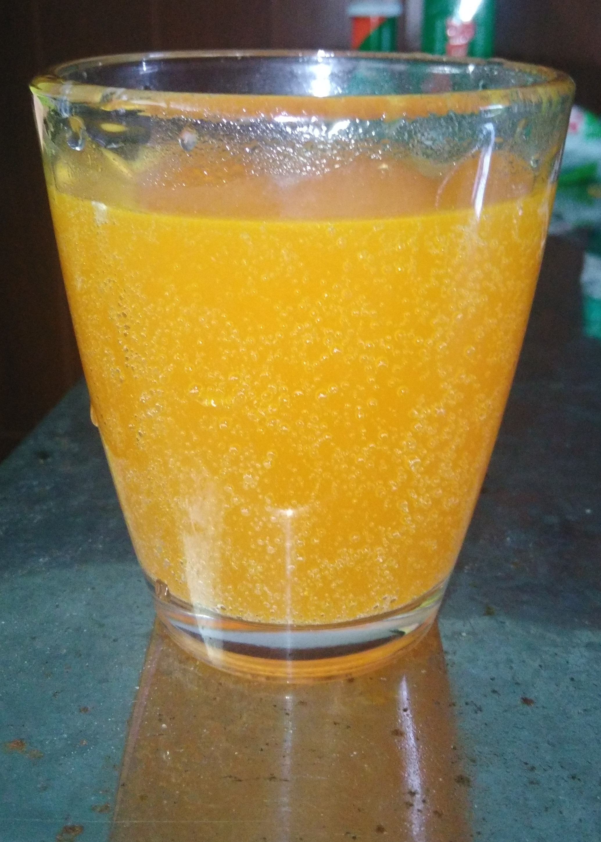 Hình tự chụp bằng máy điện thoại cá nhân về ly C sủi